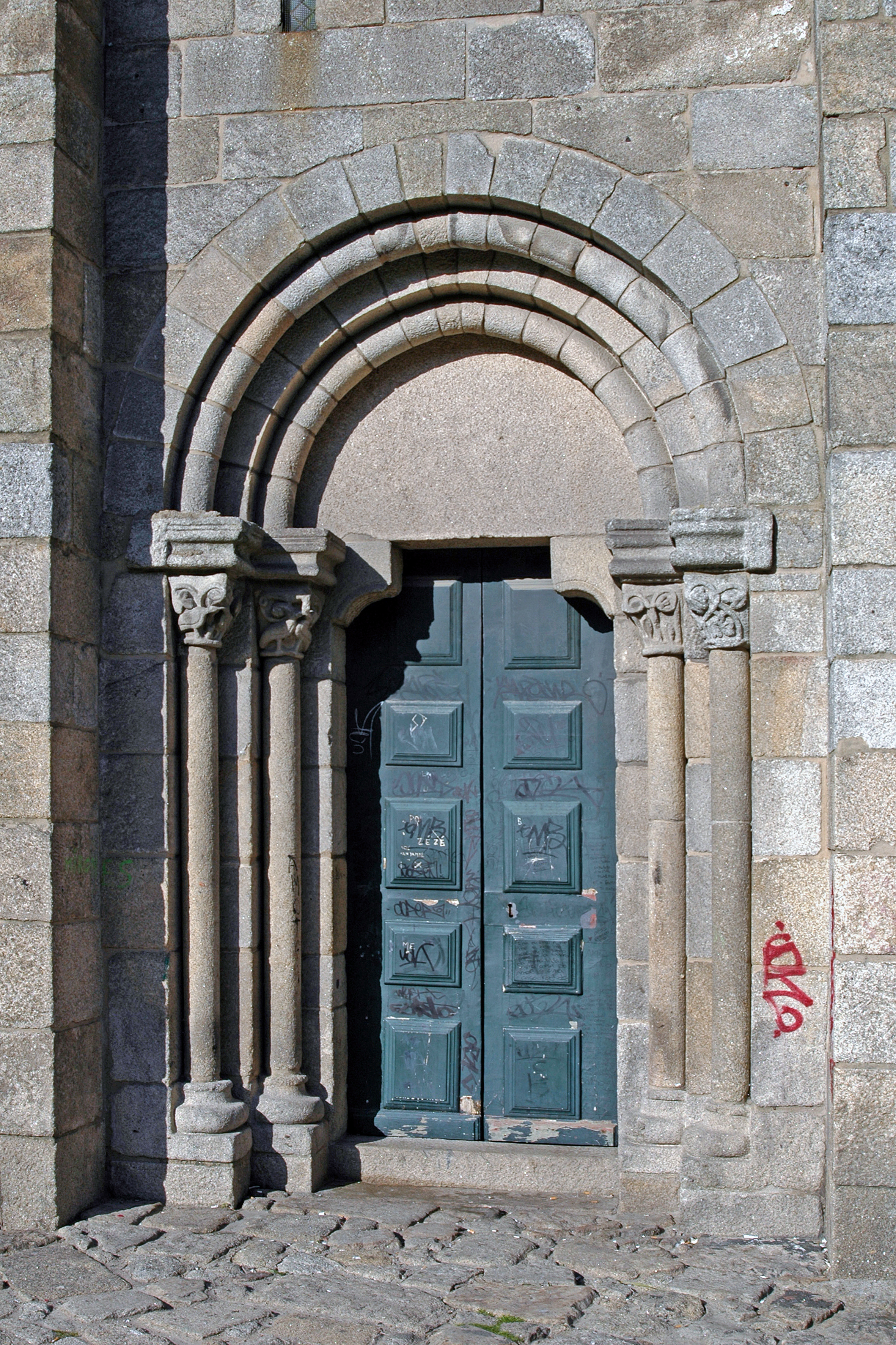 Igreja de São Martinho de Cedofeita ou Românica de Cedofeita